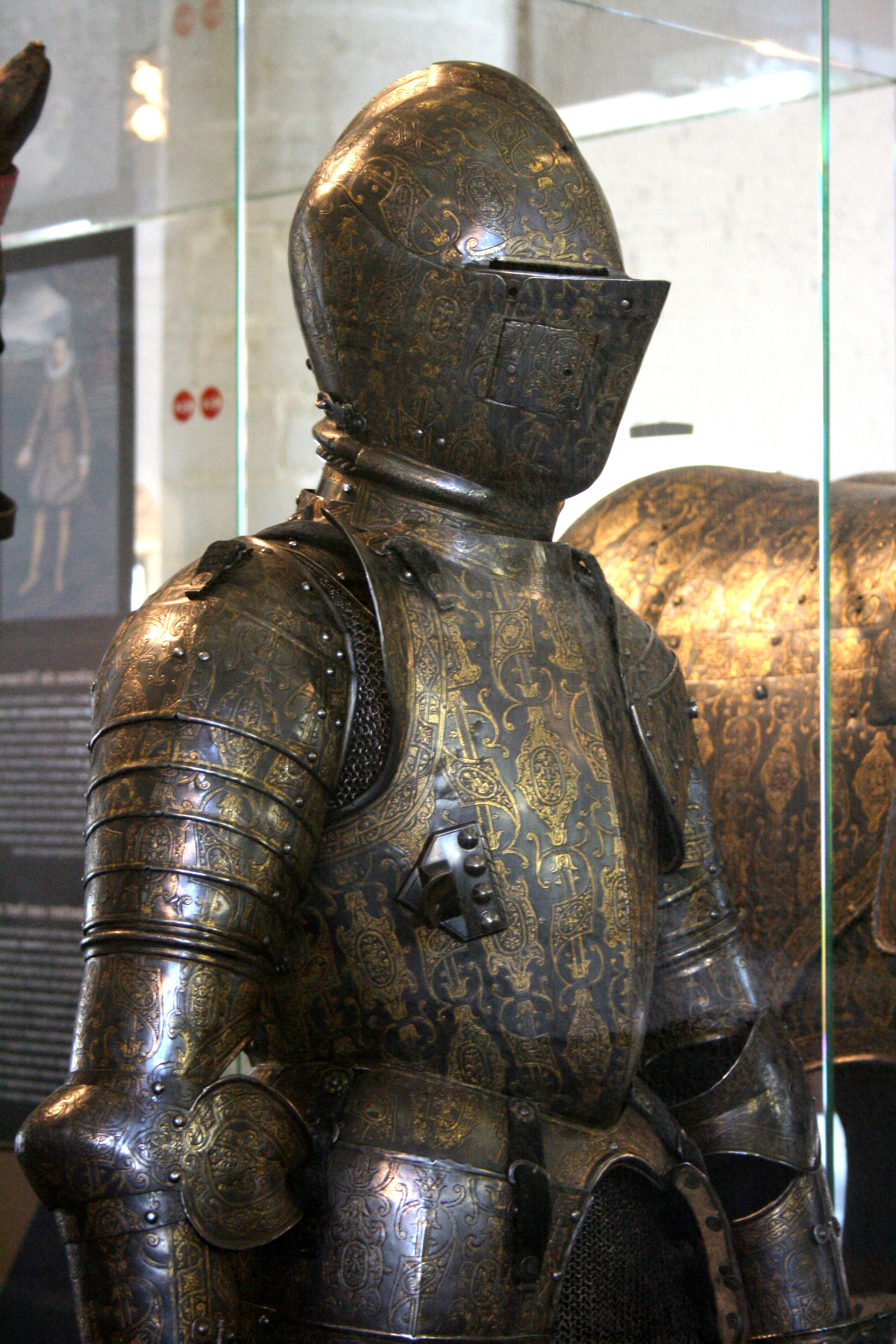 Porte de Hal, Bruxelles, Belgique. Armure d'apparat de l'archiduc Albert